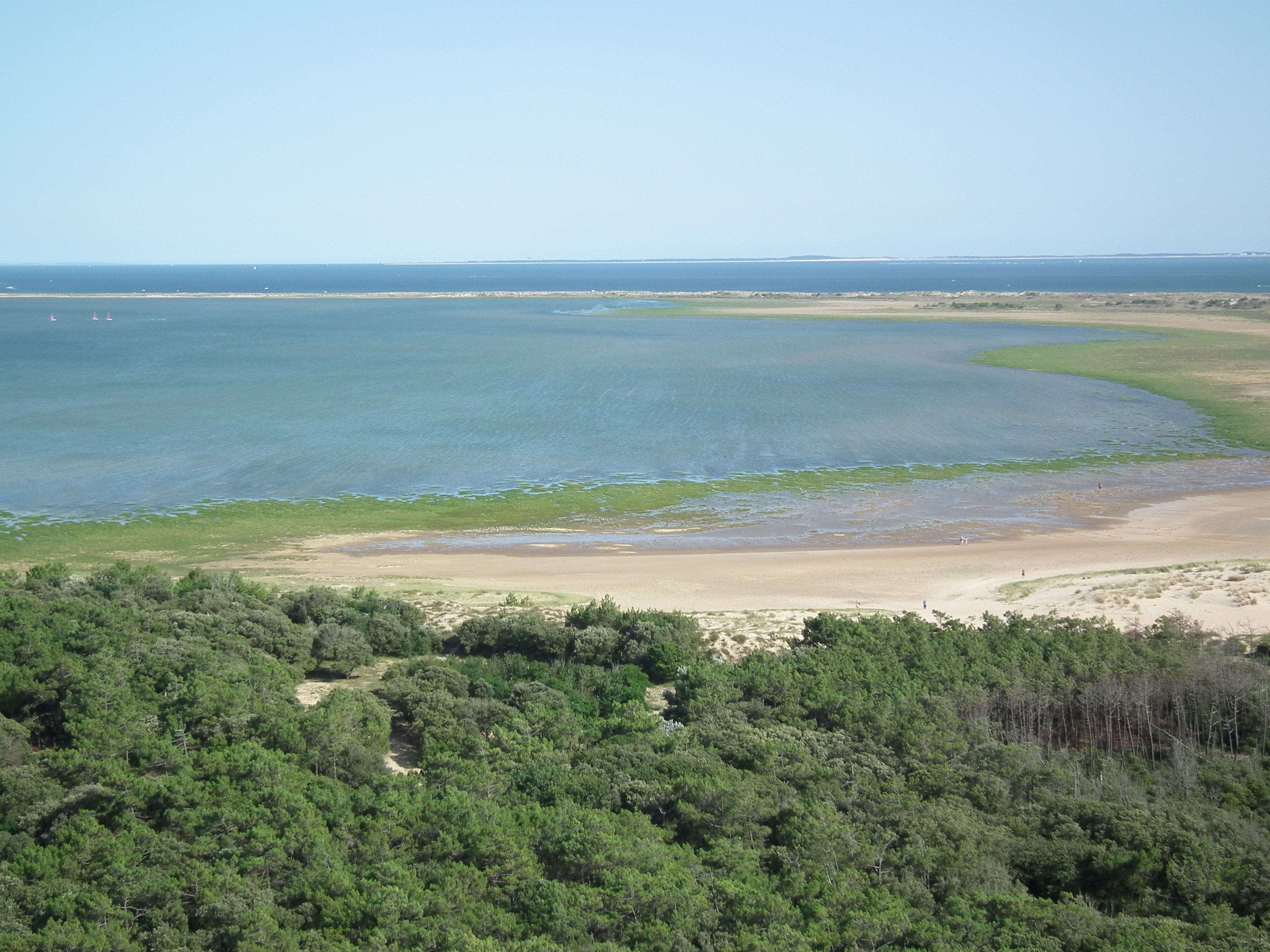 La baie de Bonne Anse